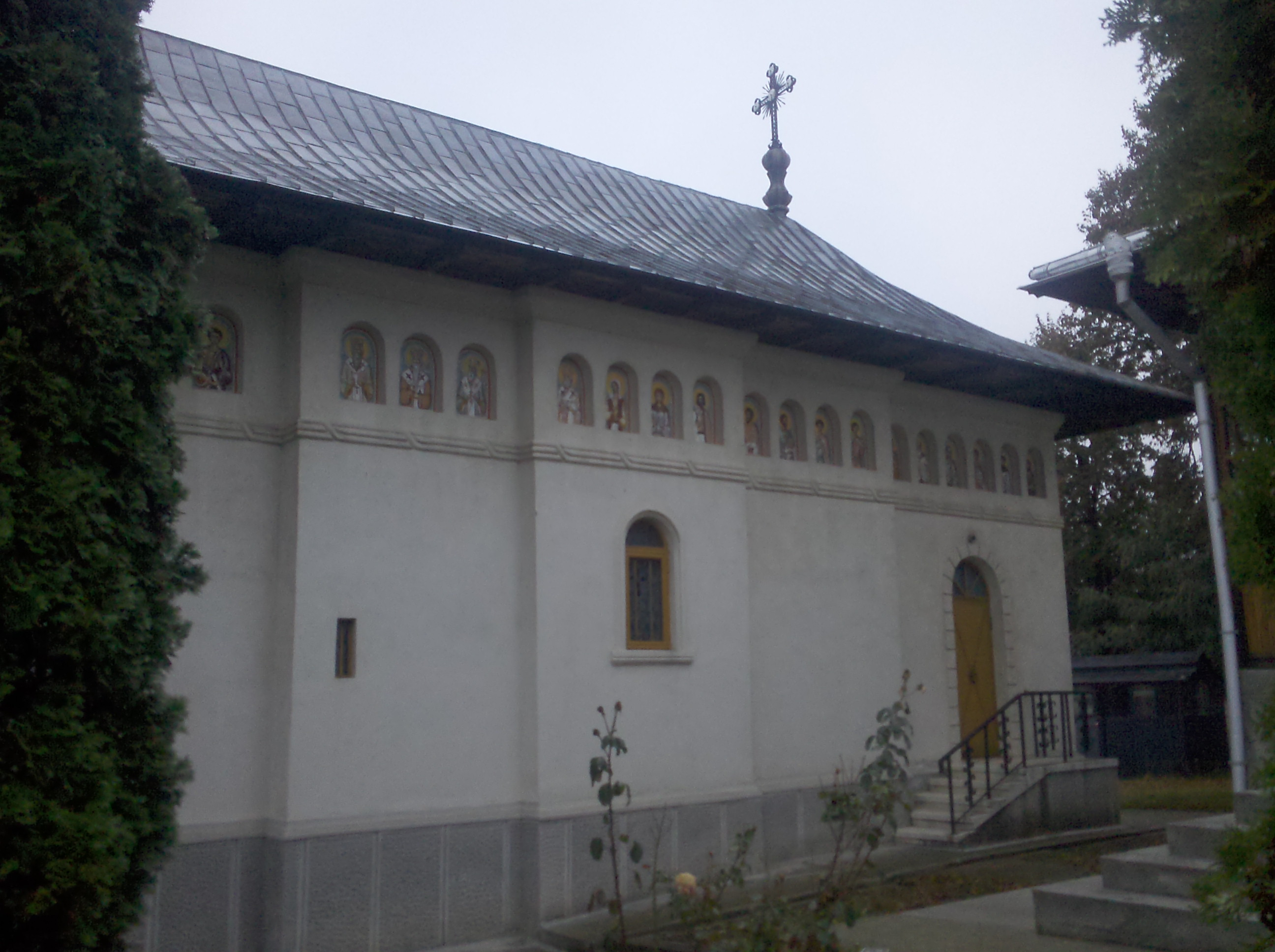 La esglesia vella del monasteri de Gorovei, Botoşani